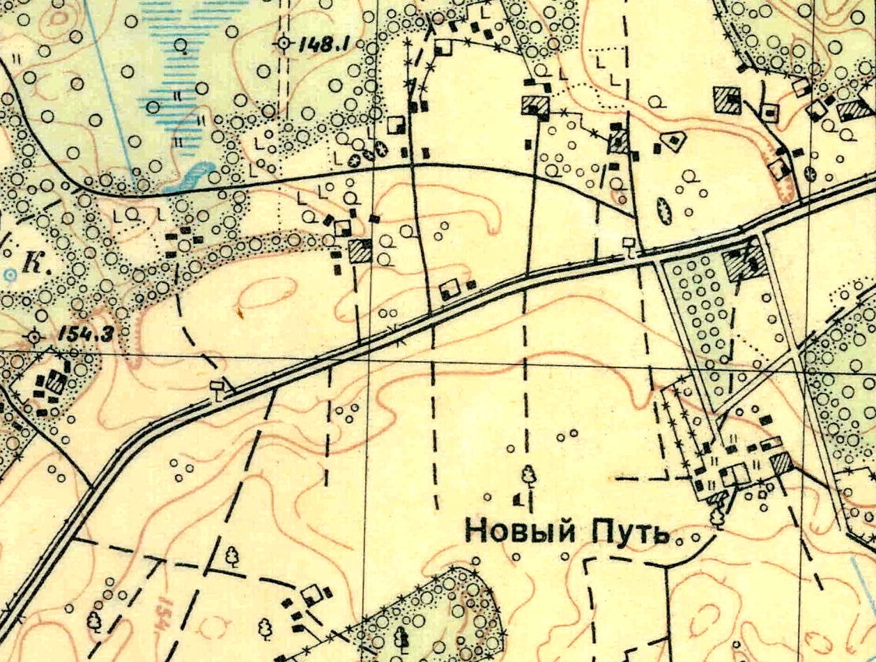 Топографическая карта Ленинградской области, квадрат О-35-23-А-в (Бол. Карчаны), посёлок Зимитицы